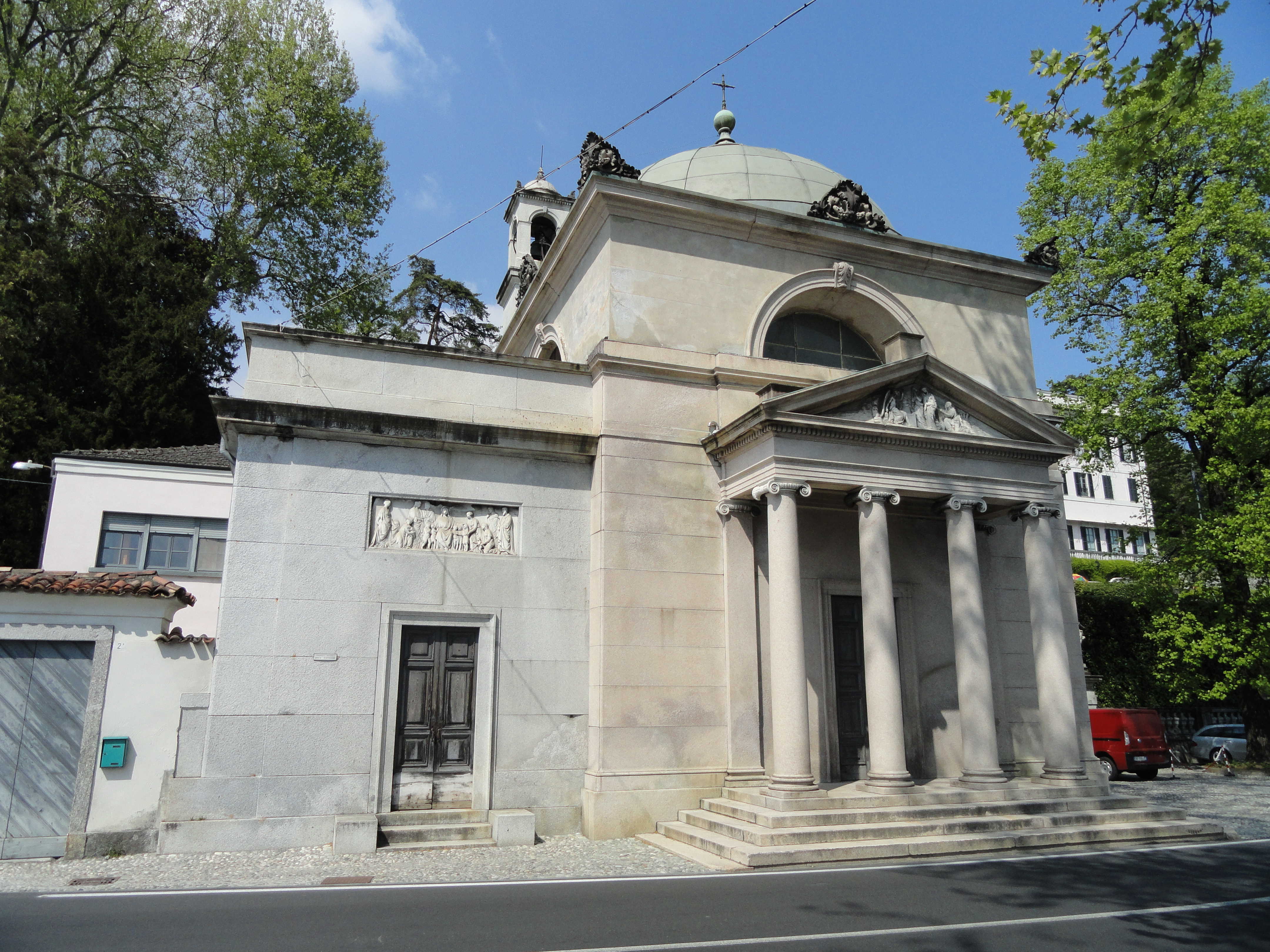 Villa Carlotta (Tremezzo), on Lake Como, Italy.